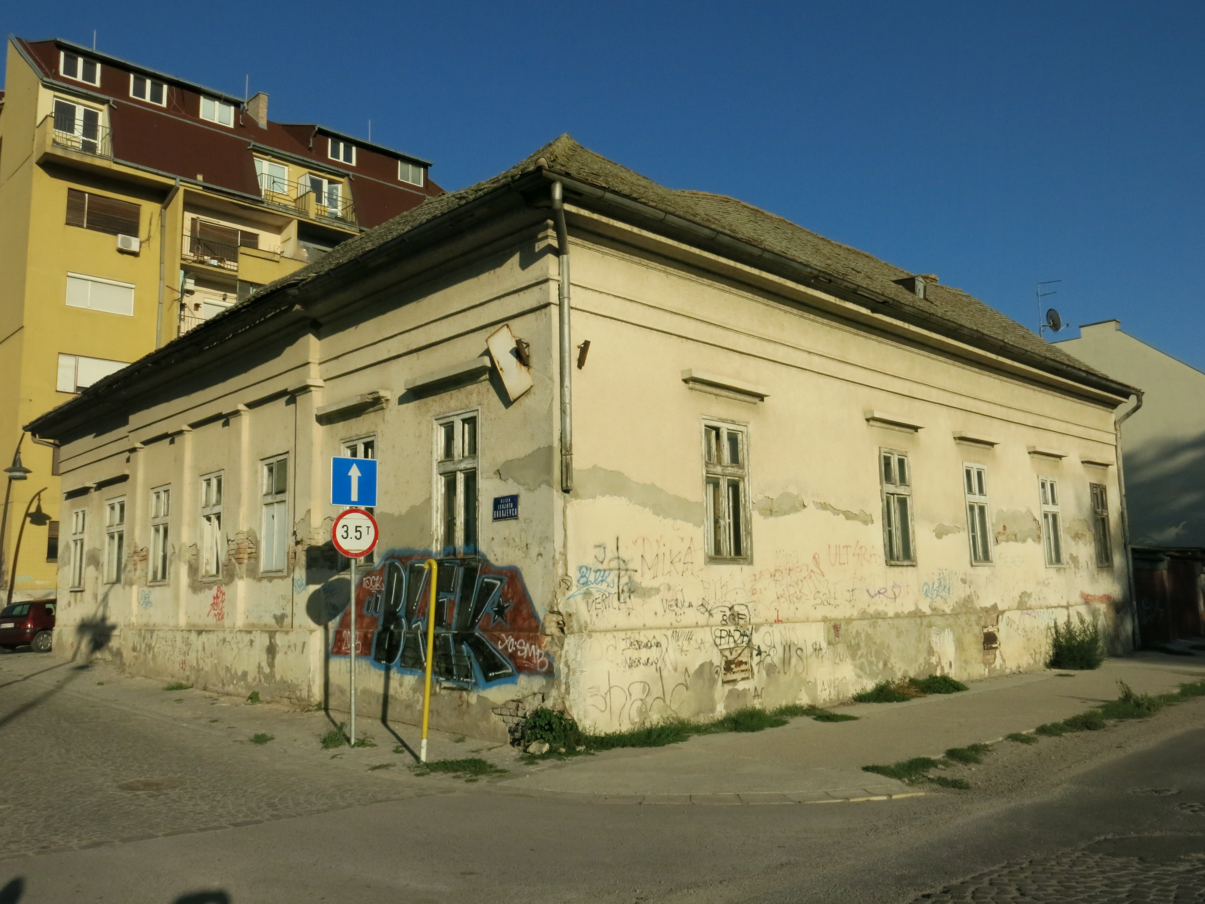 Кућа Танацковића